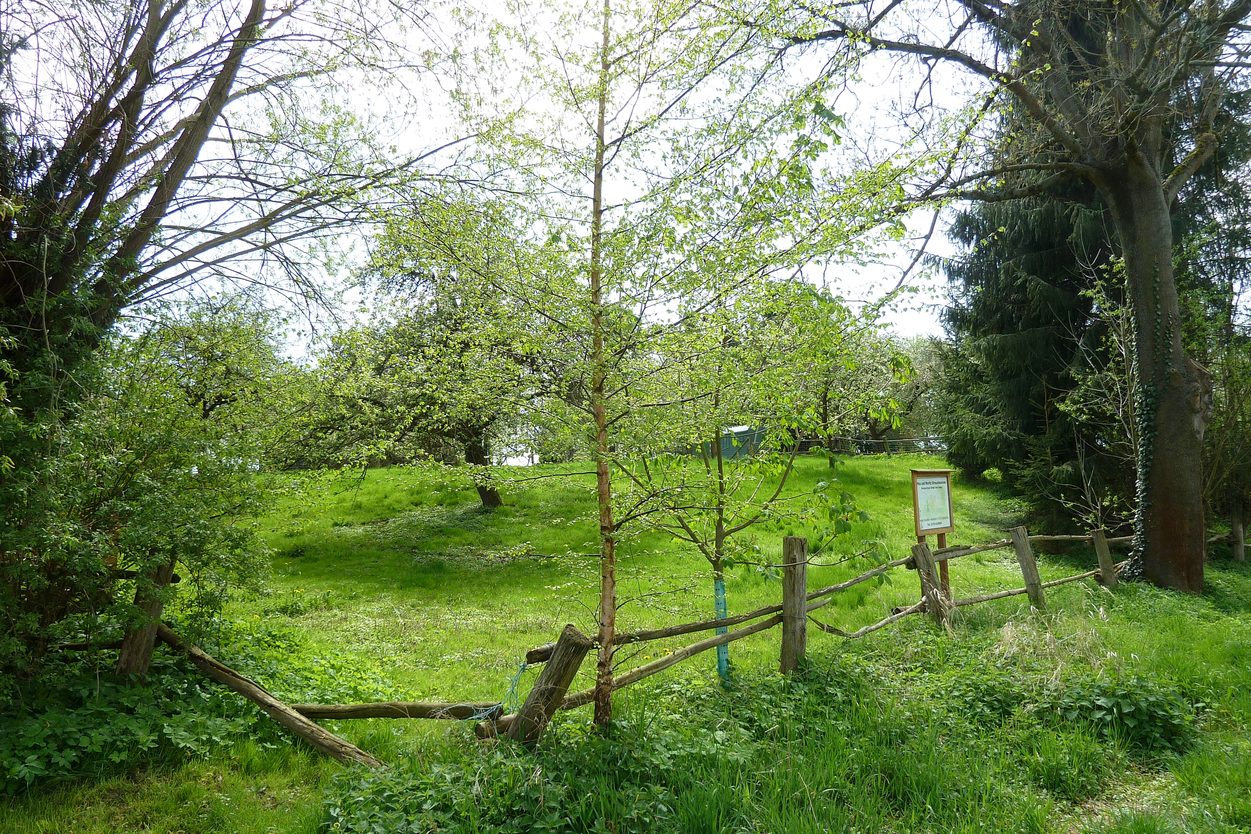 Curtis und Landgerichtsplatz bei Bernshausen